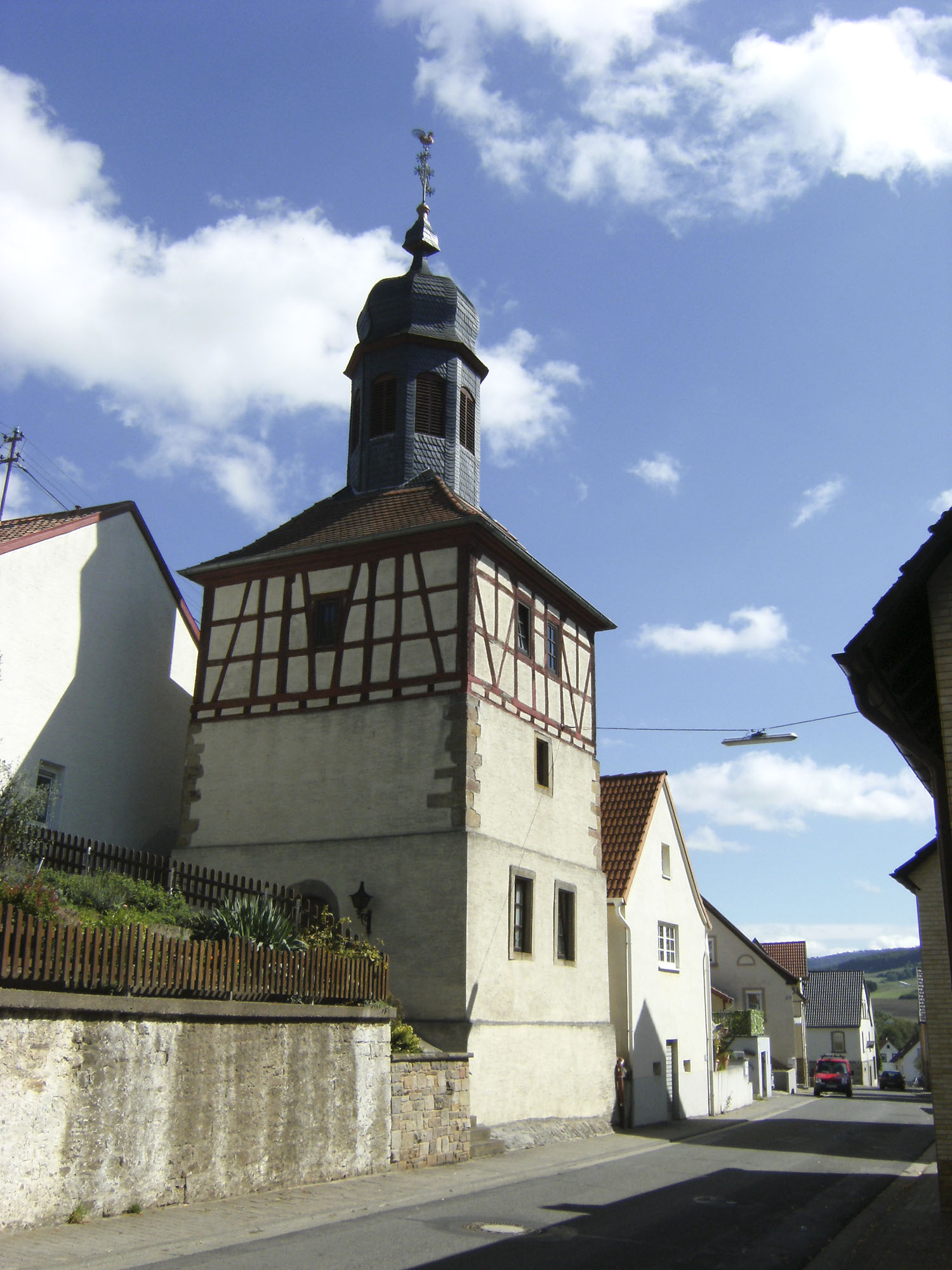 Hauptstraße 22: Glockenturm; seit 1993 Dorfmuseum, wuchtiger Walmdachbau, teilweise Fachwerk, bezeichnet 1754; Turmuhr, Architekten Philipp Nikolaus und Philipp Henn, Odernheim, Anfang des 19. Jahrhunderts; ortsbildprägend